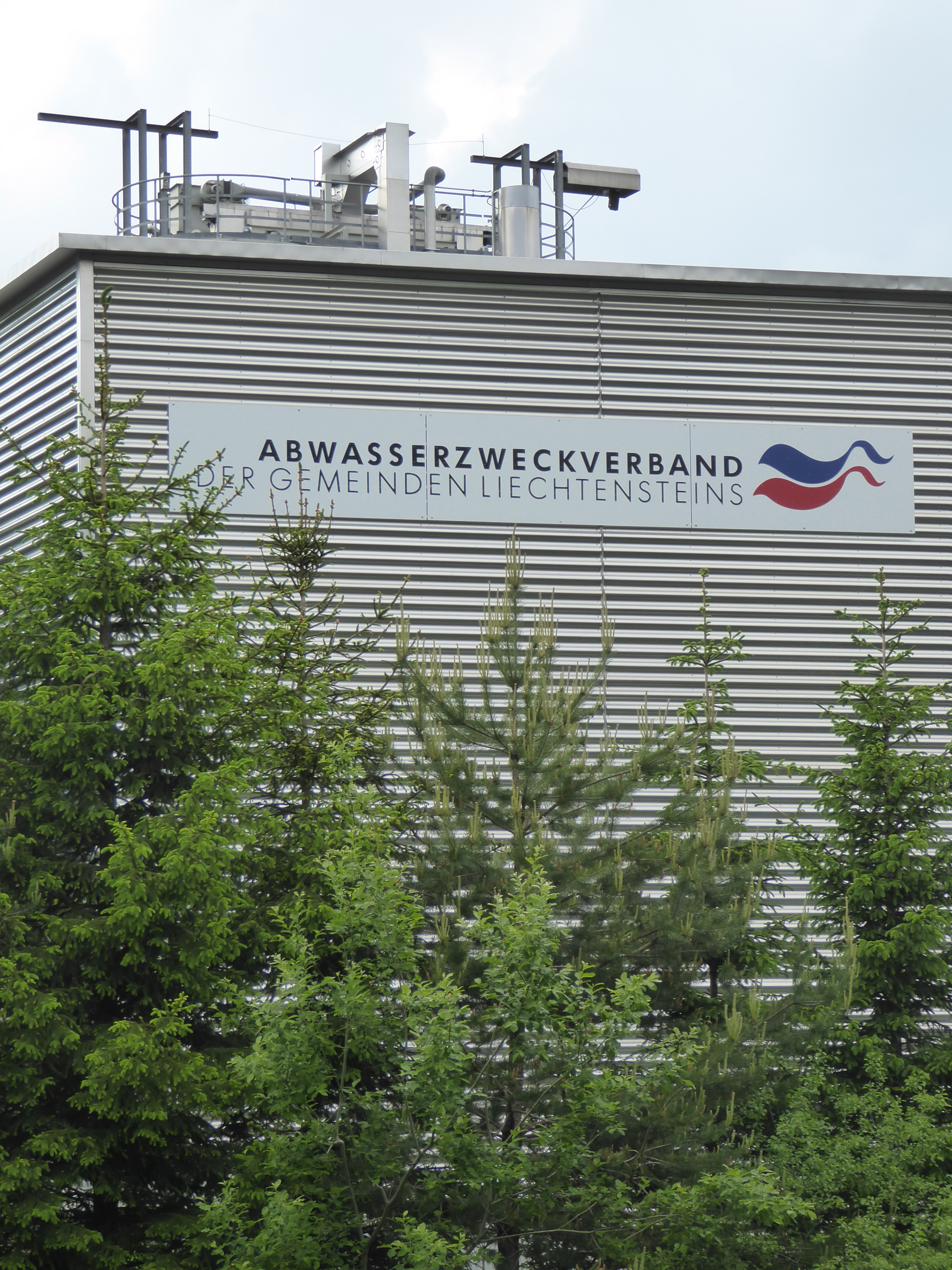 ARA Bendern des Abwasserzweckverbands Liechtenstein